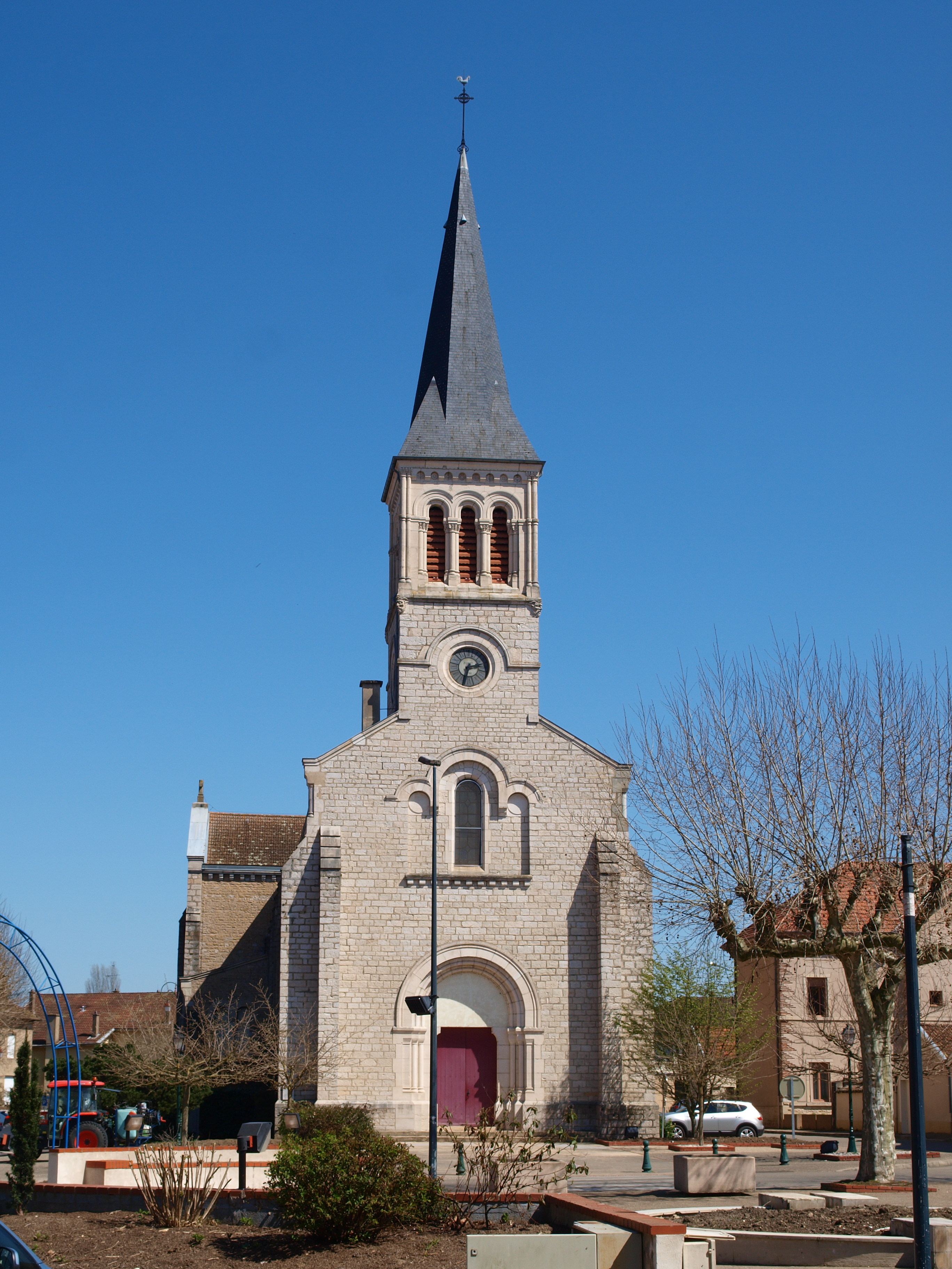 Église paroissiale de Vonnas (Ain, France)